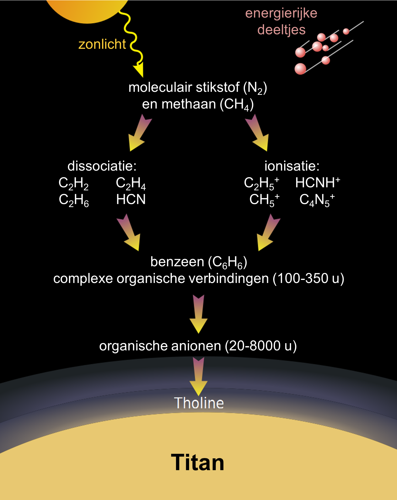 Vorming van tholine, een reeks complexe organische verbindingen, op Titan